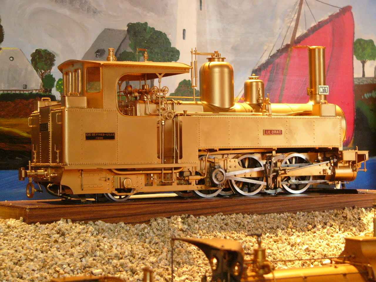 Maquette de la locomotive à vapeur N° 1 de la compagnie Saint georges de Commiers - La Mure